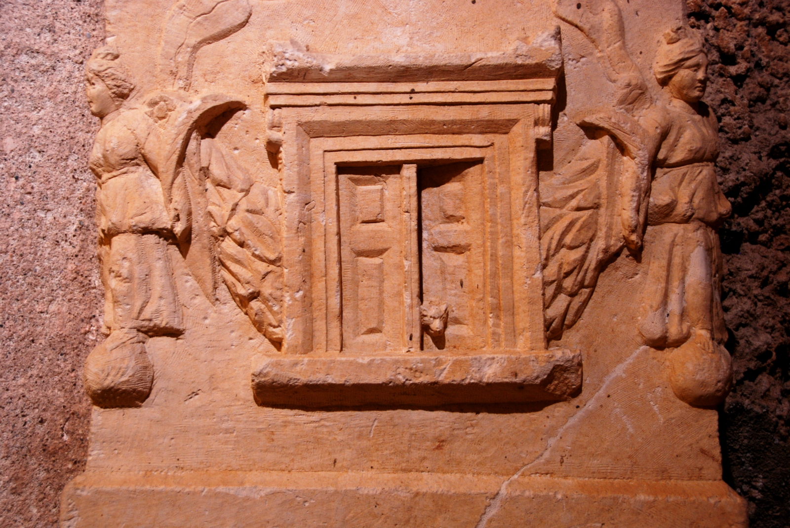 Schmalseite eines römsichen Sarkophags. Im Museum sind auch die prächtigsten Stücke der Nekropole aufgestellt.